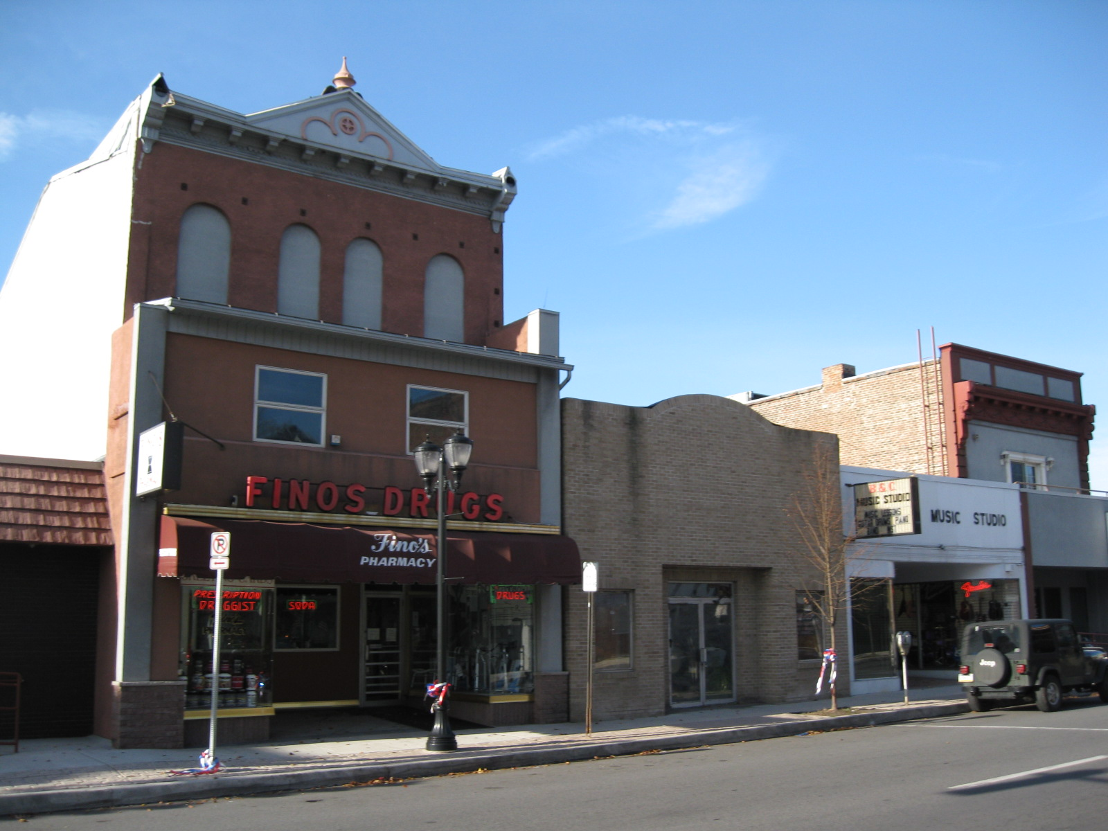 Pittston, Pennsylvania